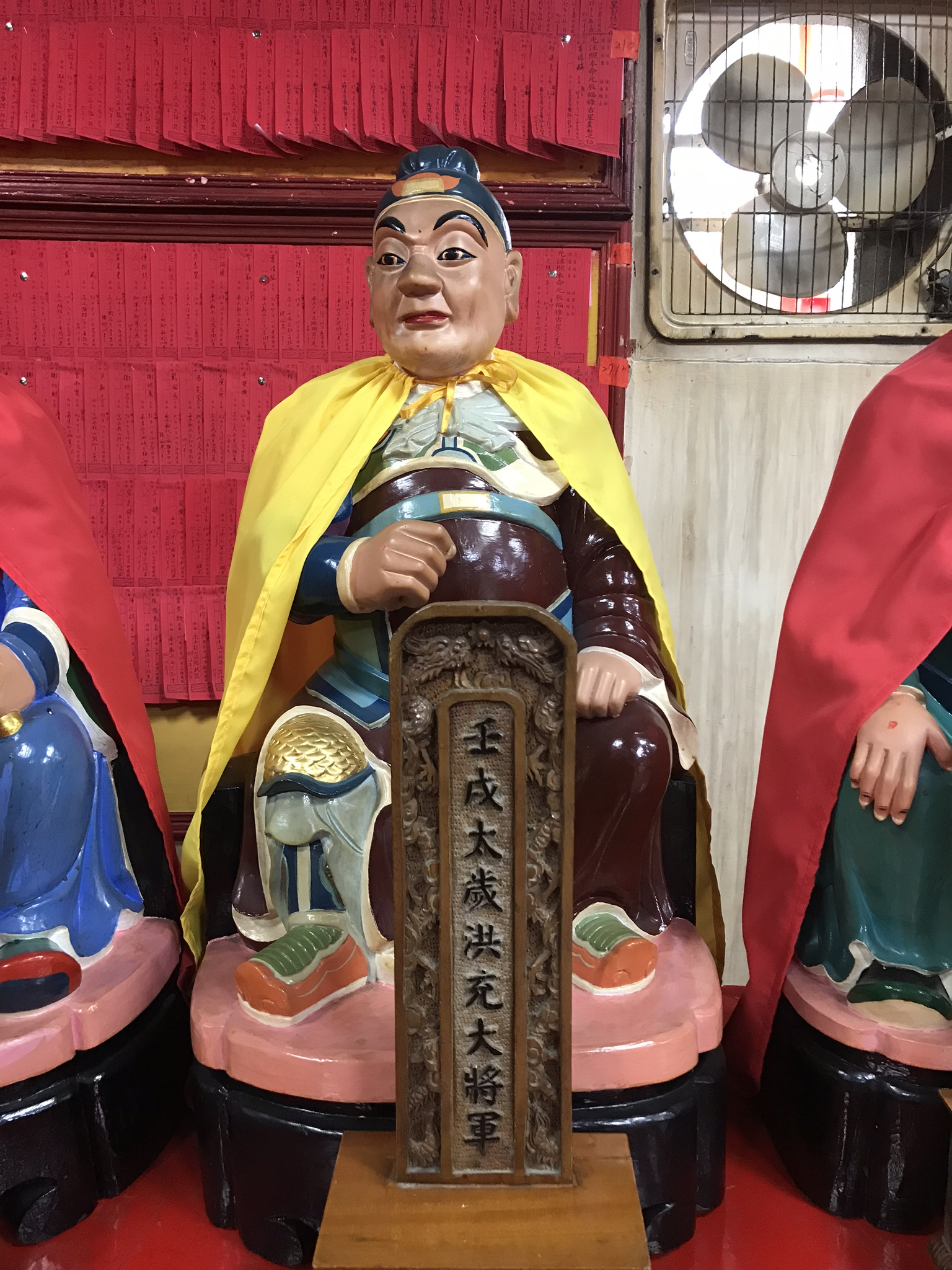 壬戌太歲洪充大將軍神像